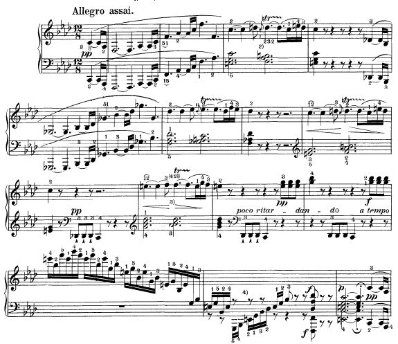 Takt 1-16 aus Beethovens op. 57